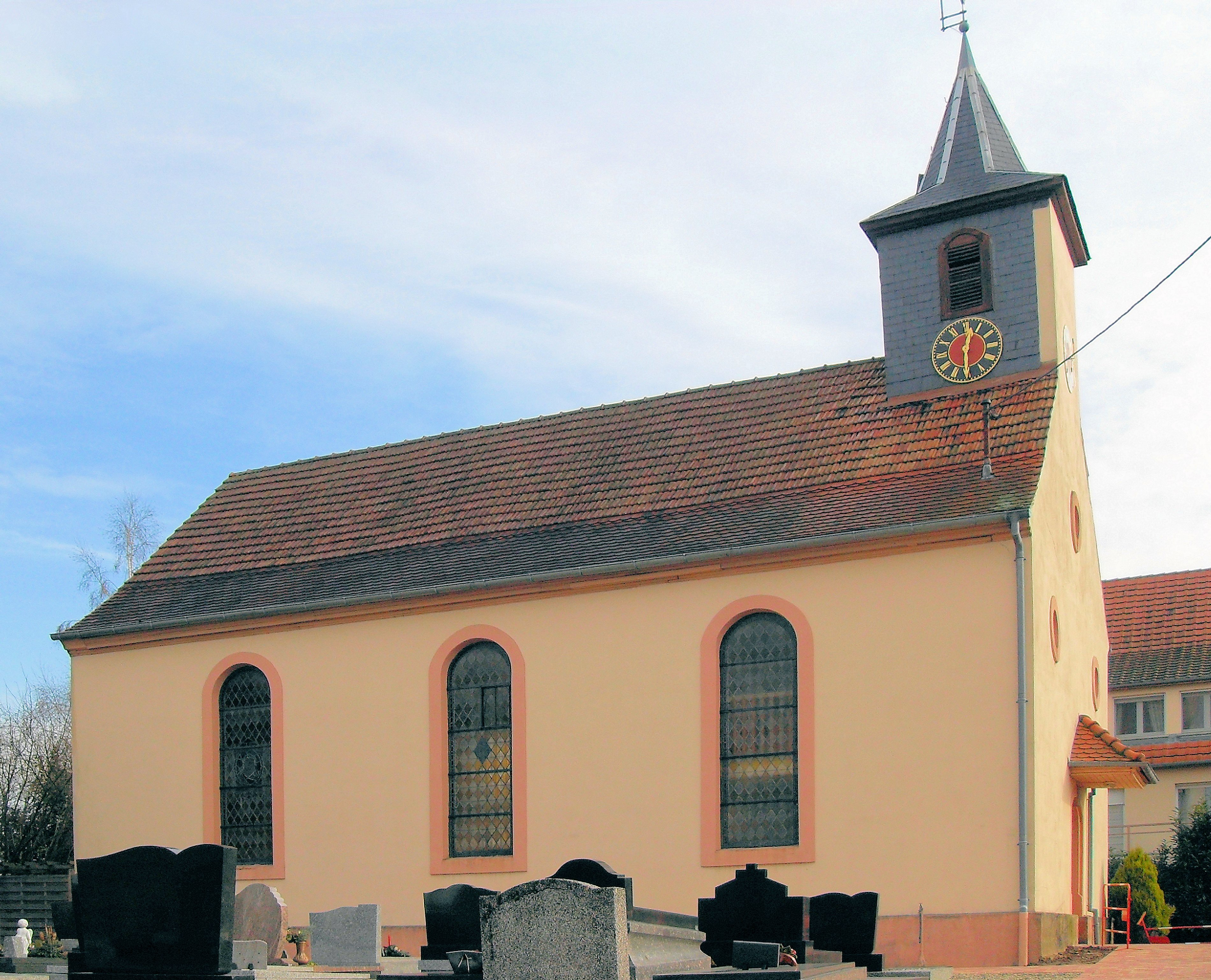 Temple Protestant et_l'ancienne chapelle_Saint-Arbogast de Bietlenheim